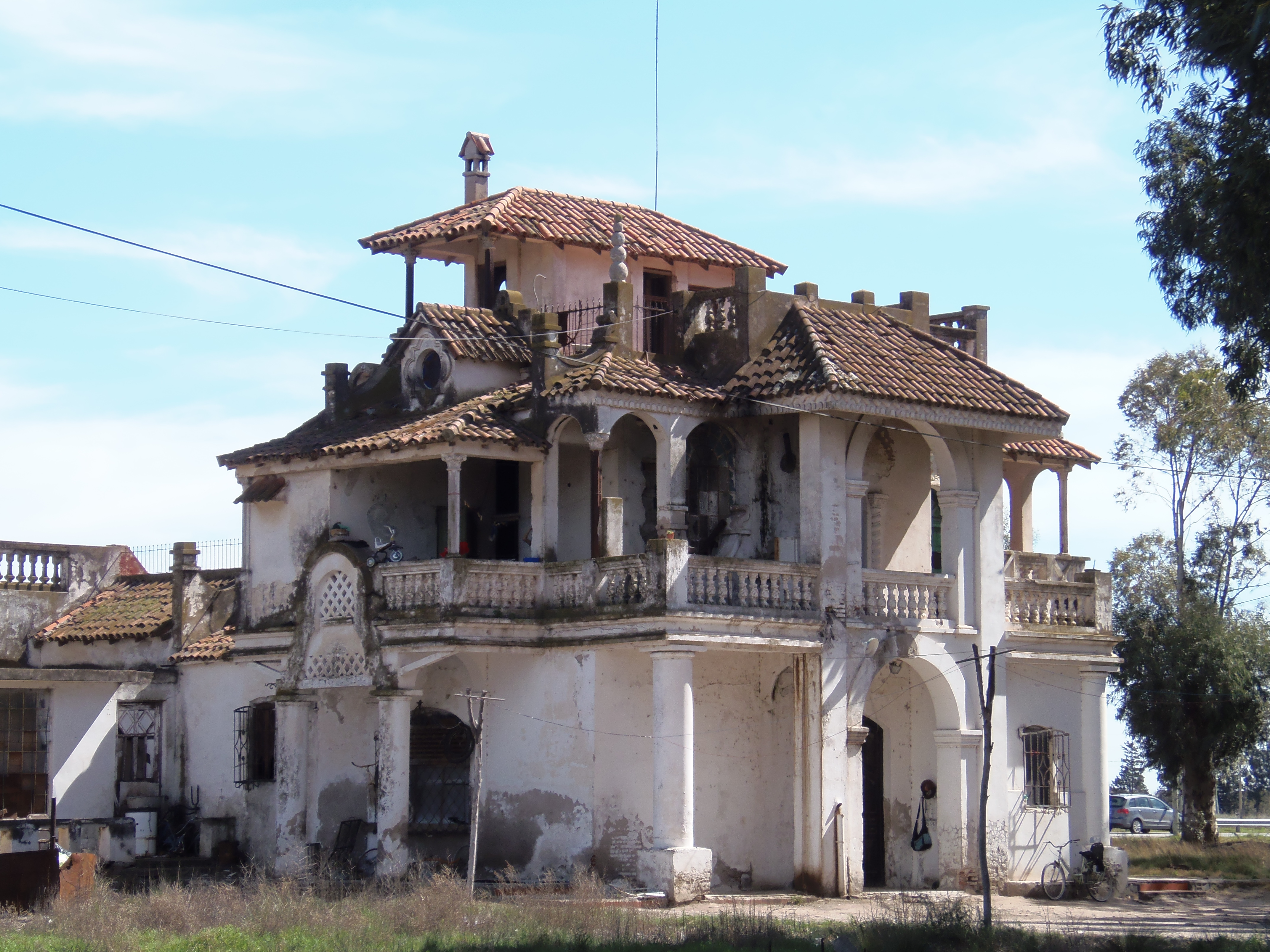 Casona en Villa Gral. Arias, data de principios del siglo pasado.